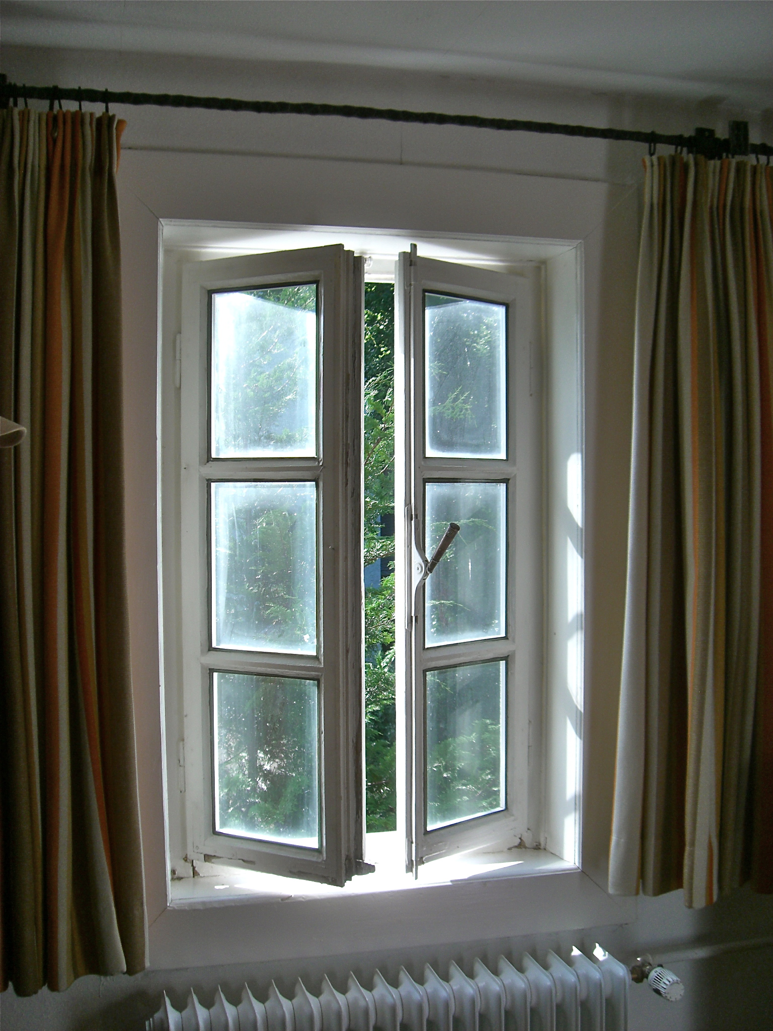 Blind werdende Isolierscheiben nach vorangegangener "energetischer Ertüchtigung" an historischen Fenstern.